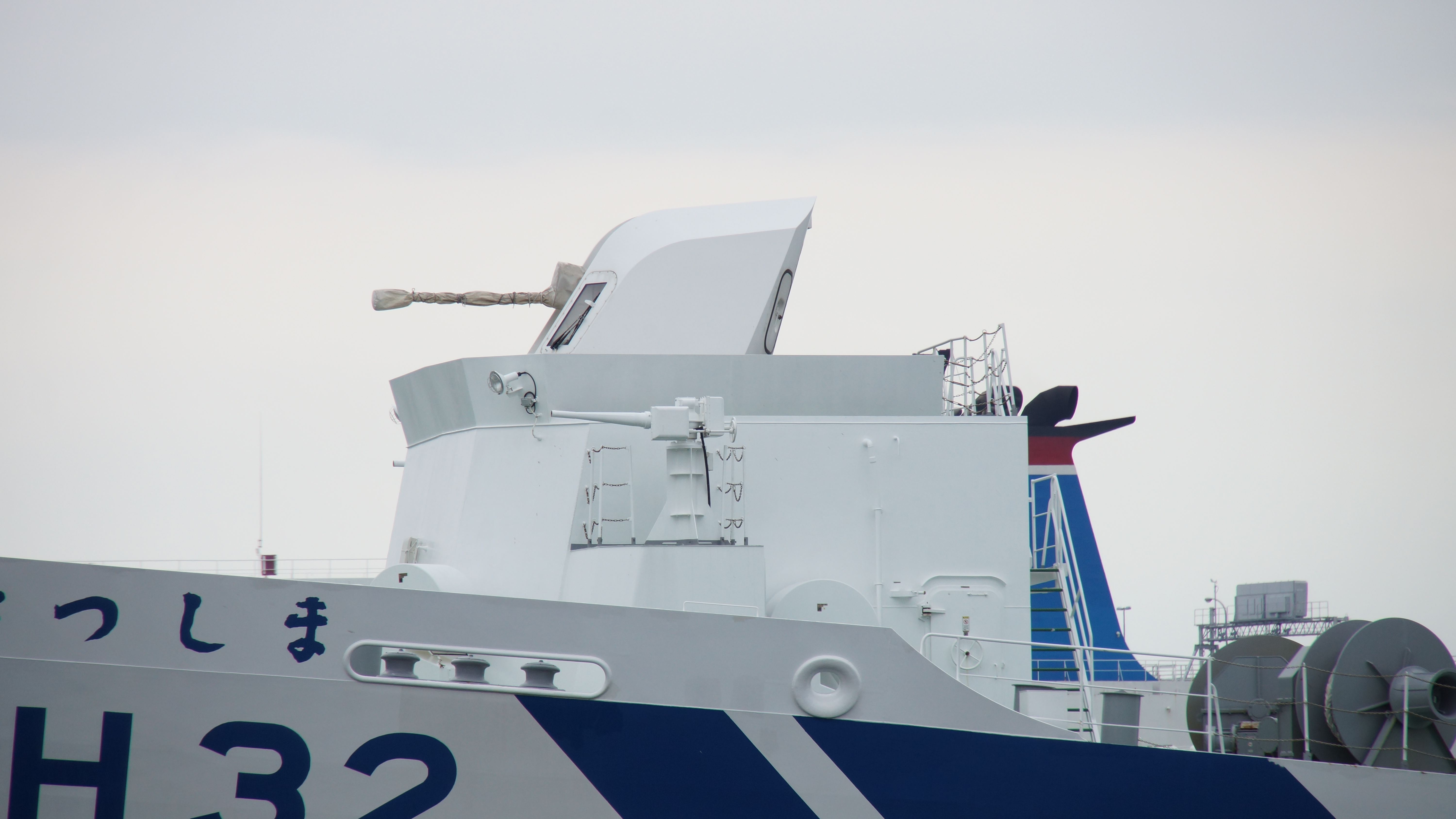 海上保安庁 ヘリコプター搭載型巡視船あきつしま（PLH-32） 船首側のボフォース40mm機関砲。2017年7月9日 神戸港にて。